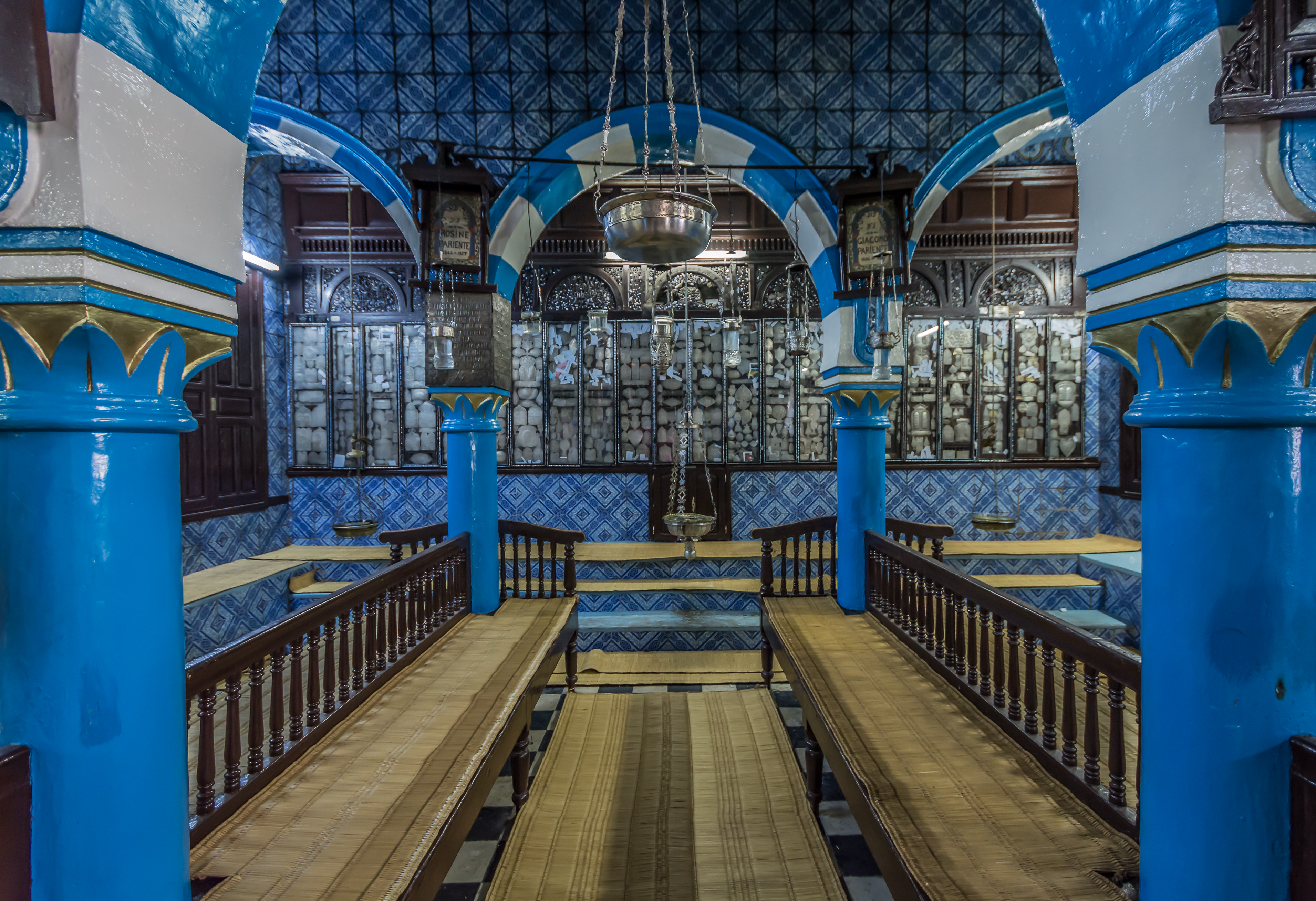 Synagogue de la Hara-Srira